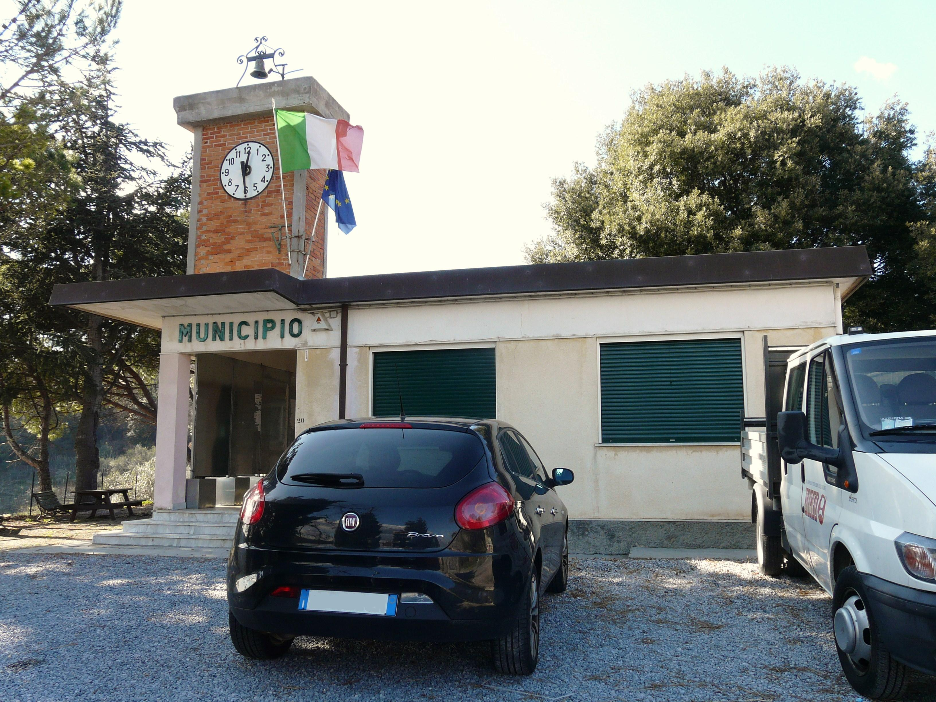 Municipio di Vezzi Portio, Liguria, Italia